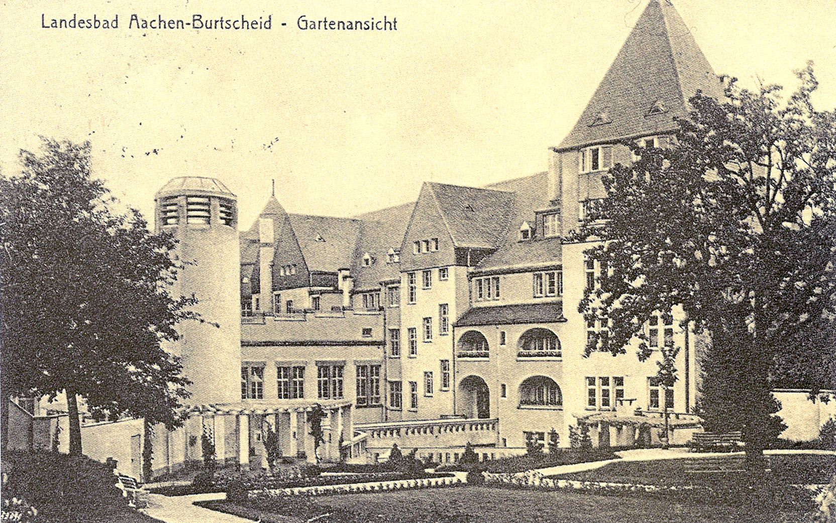 Gartenansicht des Landesbades mit dem Abkühlturm für das Thermalwasser, 1916